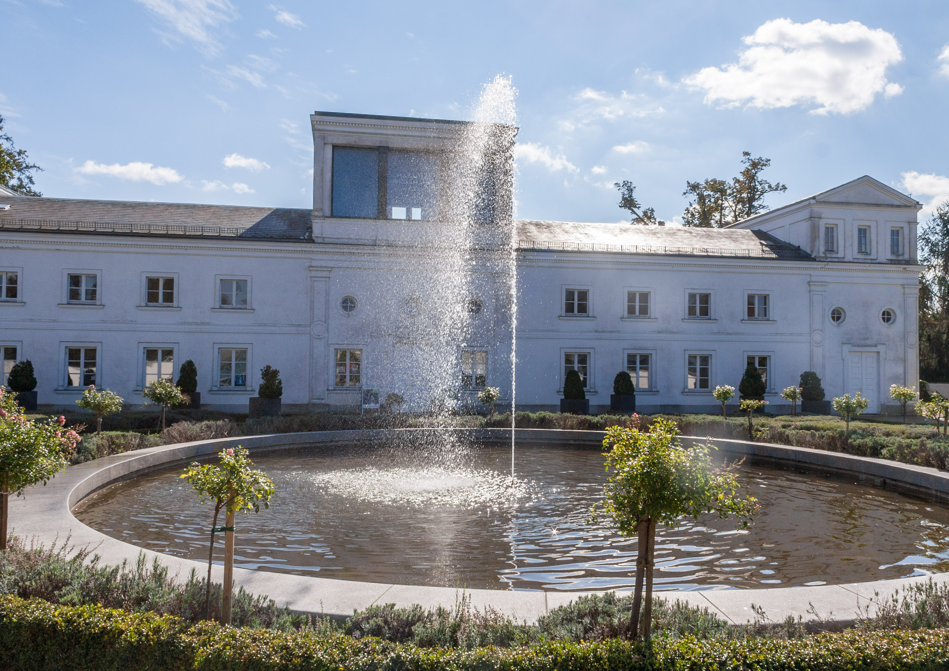 Putbus, Alleestraße 35, Baudenkmal=576, Orangerie mit Torhäusern (Schlosspark), Rügen